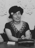 Ilustrowany Kurier Codzienny, 1926